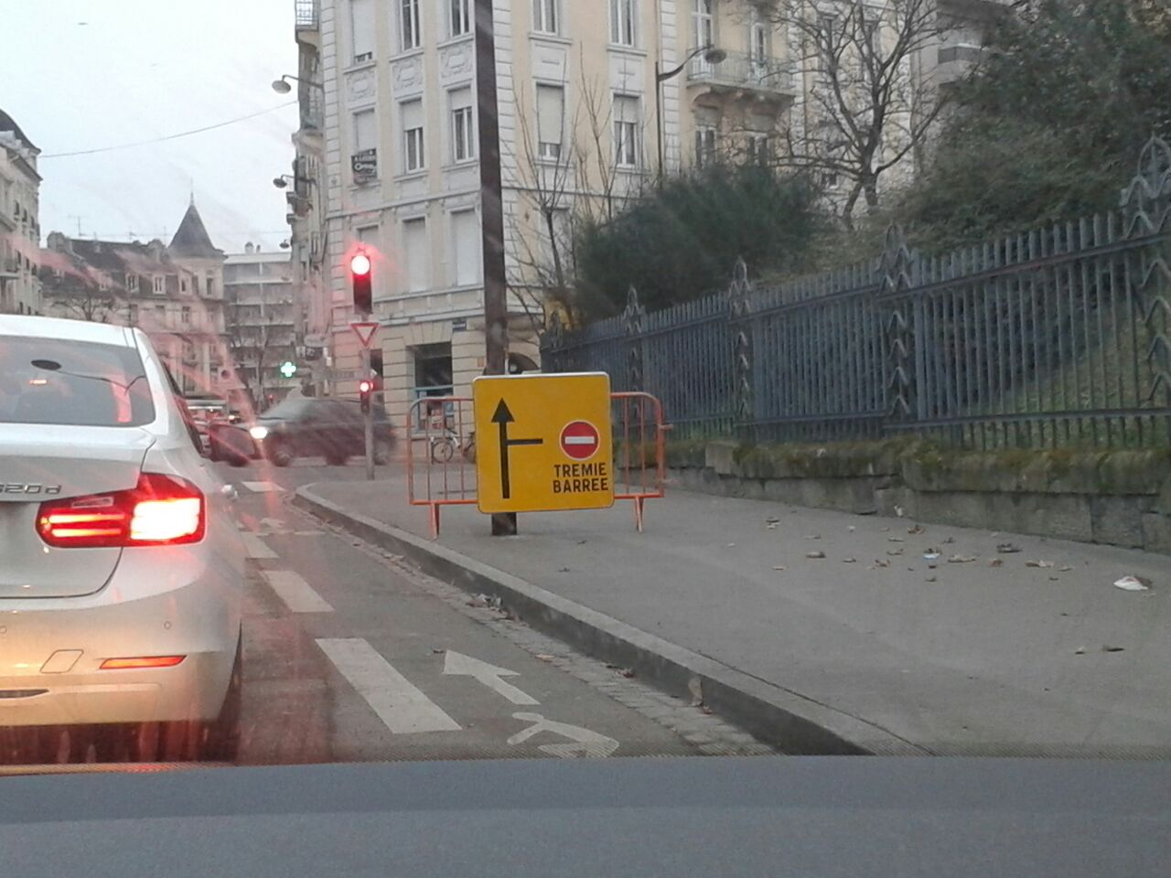 Utilisation du mot "trémie" sur panneau de signalisation à Metz, France